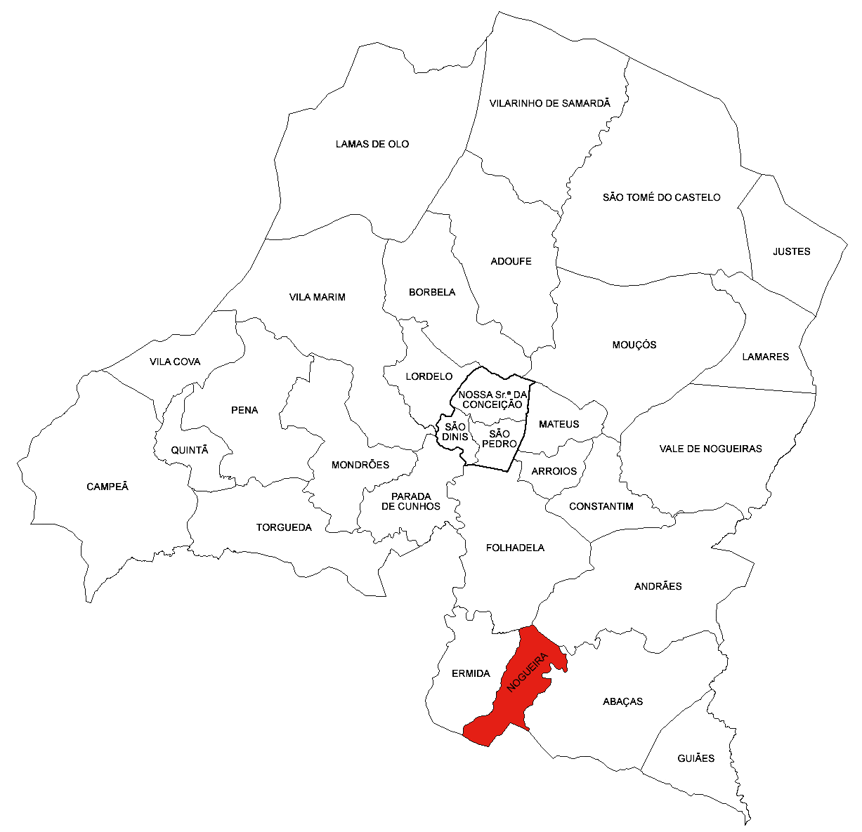 Freguesia de Nogueira (concelho de Vila Real)